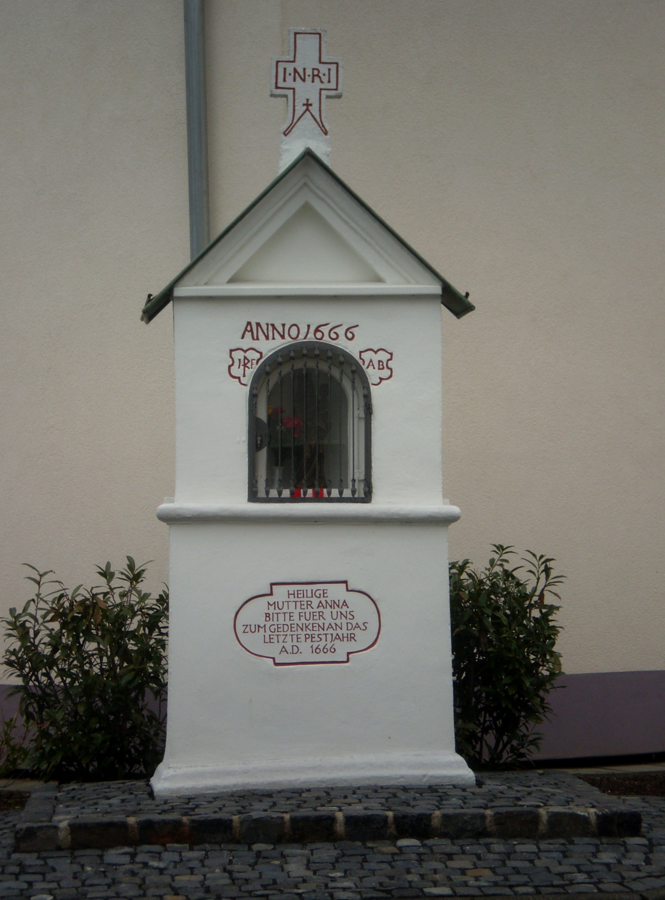 Heiligenhäuschen (sog. Annabildchen), Ecke Selhofer/Beueler Straße in Selhof, Bad Honnef